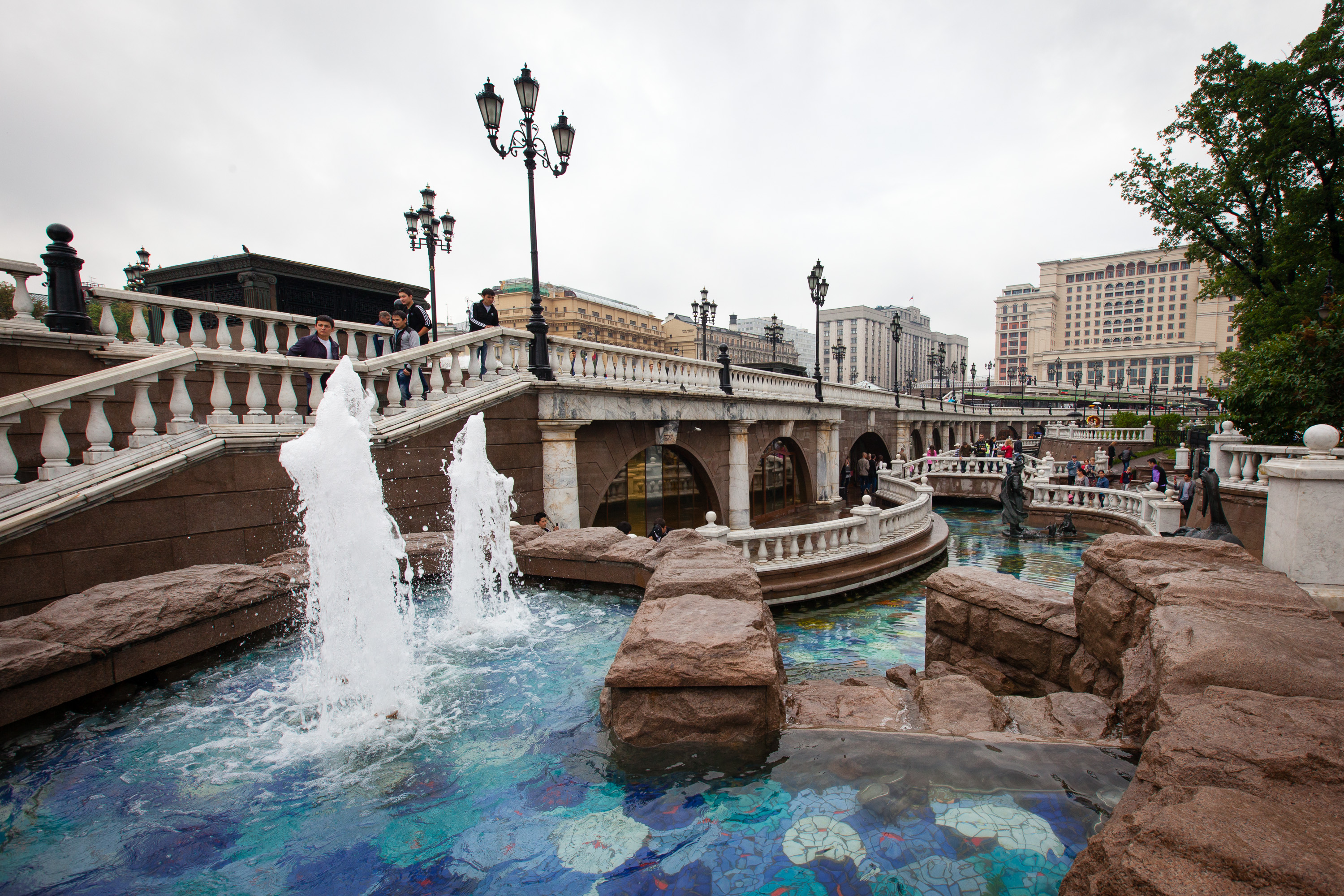 Moscow